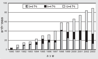 מספר ילדים מצטבר עד גיל 12 שנה החיים עם נגיף האיידס בישראל בשנים 1990-2003